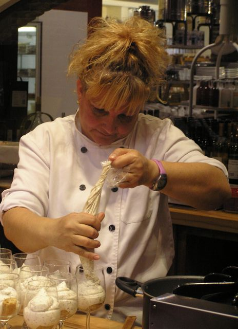 השף רות אוליבר במהלך עבודתה